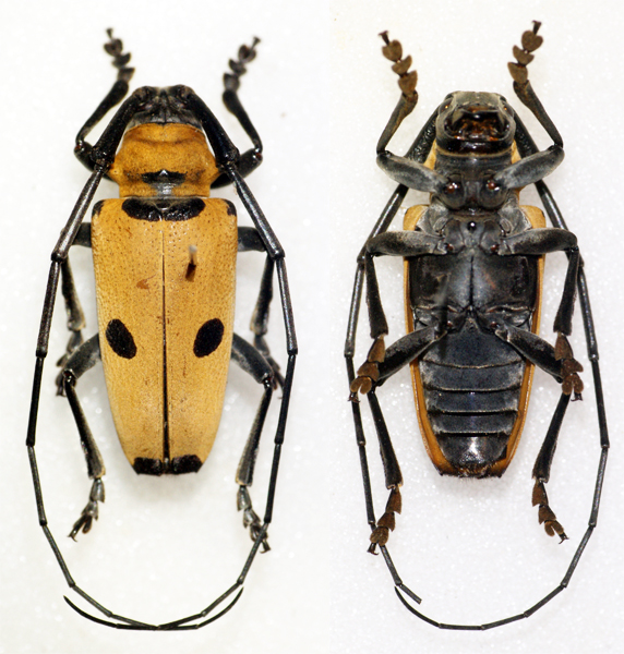 Erichson,1834 Sex: Male Data: 07-2013 - Dingalan - North Luzon - Philppines Size: ?